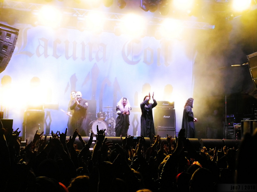 Lacuna Coil esinemas muusikafestivalil Hard Rock Laager 2018.